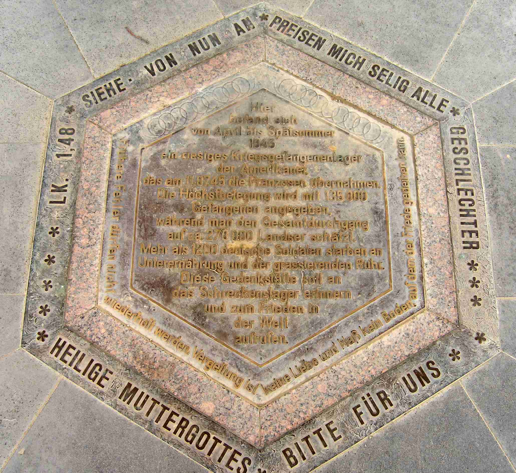 Die Inschrift der im Boden der Kapelle Schwarze Madonna in Remagen eingelassene Bodenplatte